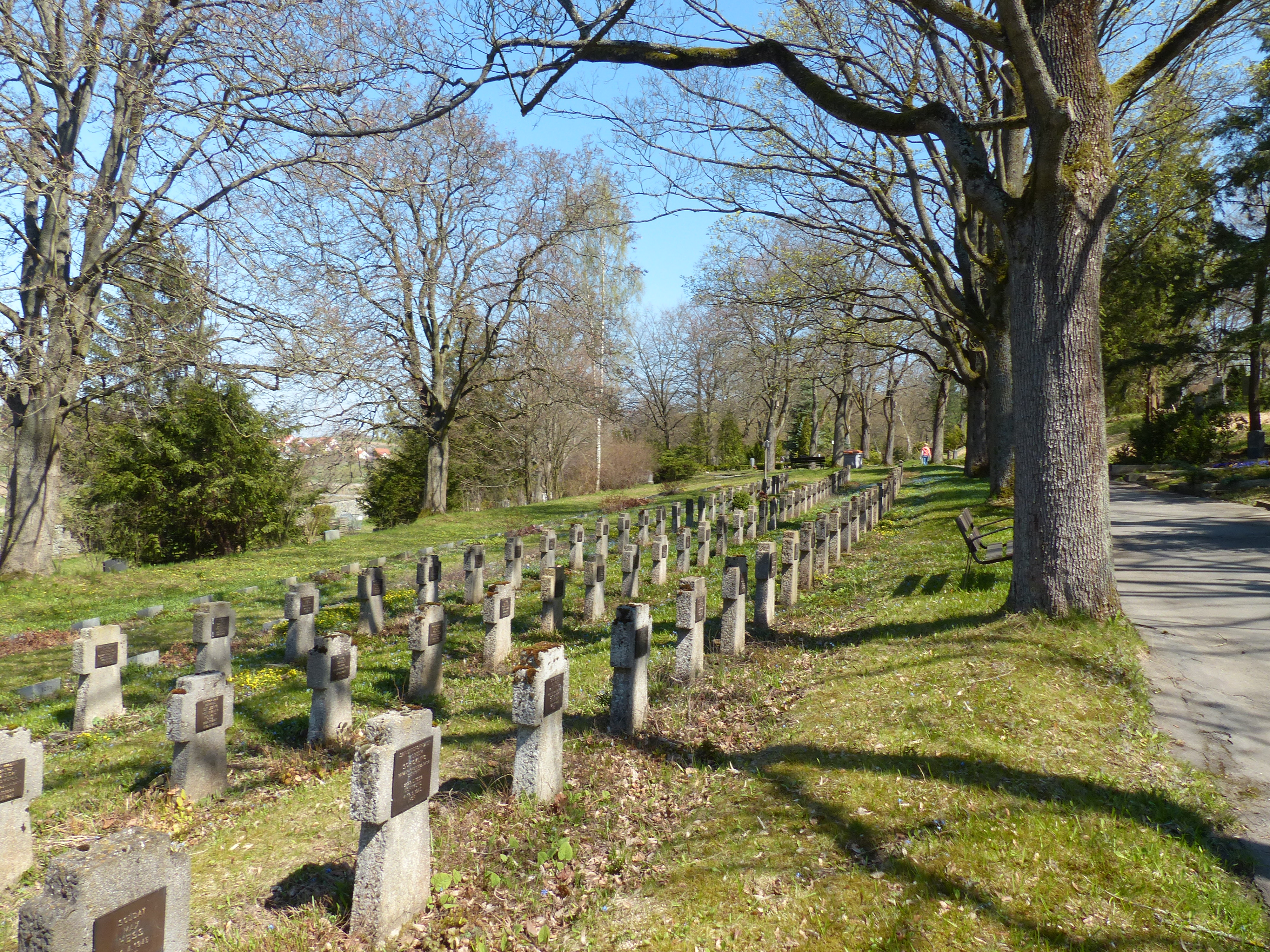 Kriegsgräberfriedhof Hof: Gräberfeld WW2